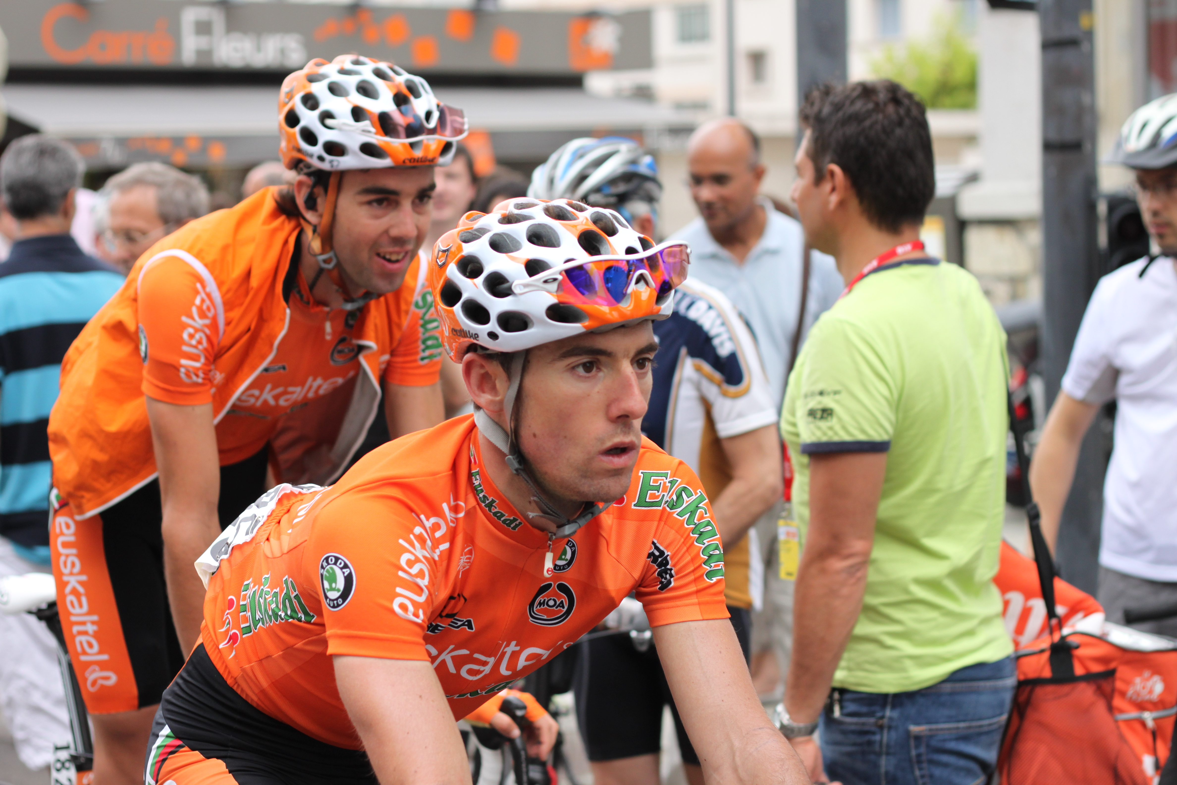 Alan Pérez Lezaun à son arrivée à Grenoble après la 5e étape du Critérium du Dauphiné 2010